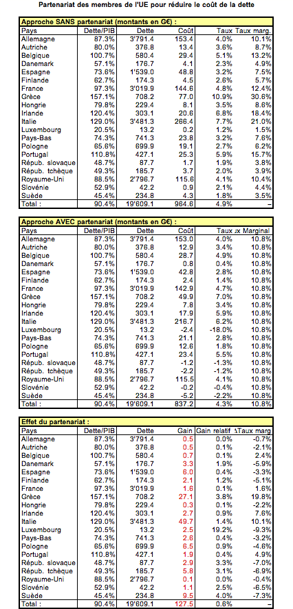 Exemple d’exploitation de la synergie sur les coûts annuels des dettes de l’UE. Valeurs numériques tirées de l'OCDE conduisant à une illustration d'un mécanisme de répartition du bénéfice.